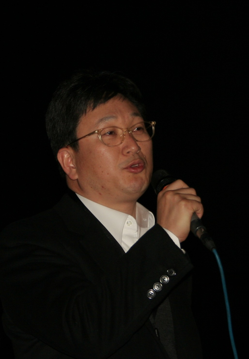 Jeon Kyu-hwan, festival international des cinémas d'Asie 2010, Vesoul, France.